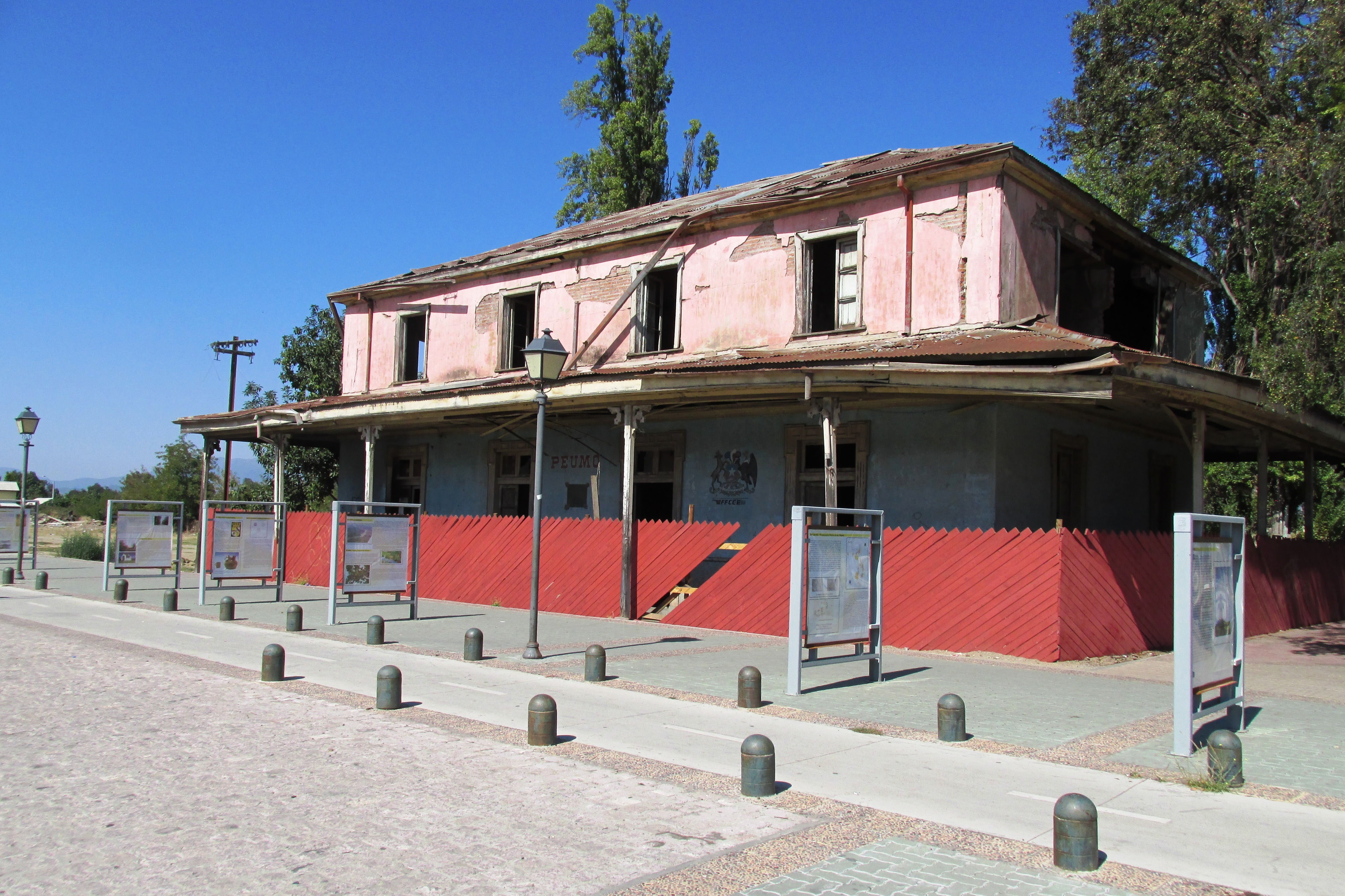 Estación Ferrocarril Peumo, Monumento Nacional ubicado en la comuna de Peumo Región del Libertador Bernardo O"higgins Chile